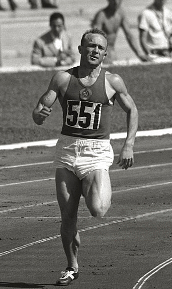 Konstantin Grachev running 400 m. Rome, 1960